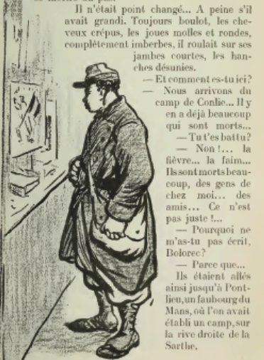 Illustration d'Henri-Gabriel Ibels (1867-1936) pour "Sébastien Roch", roman d'Octave Mirbeau (1848-1917). Éditions Fasquelle, 1906.